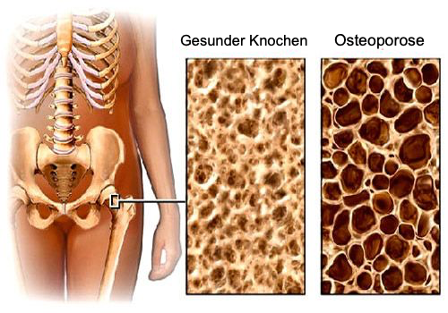 Oberschenkelhals